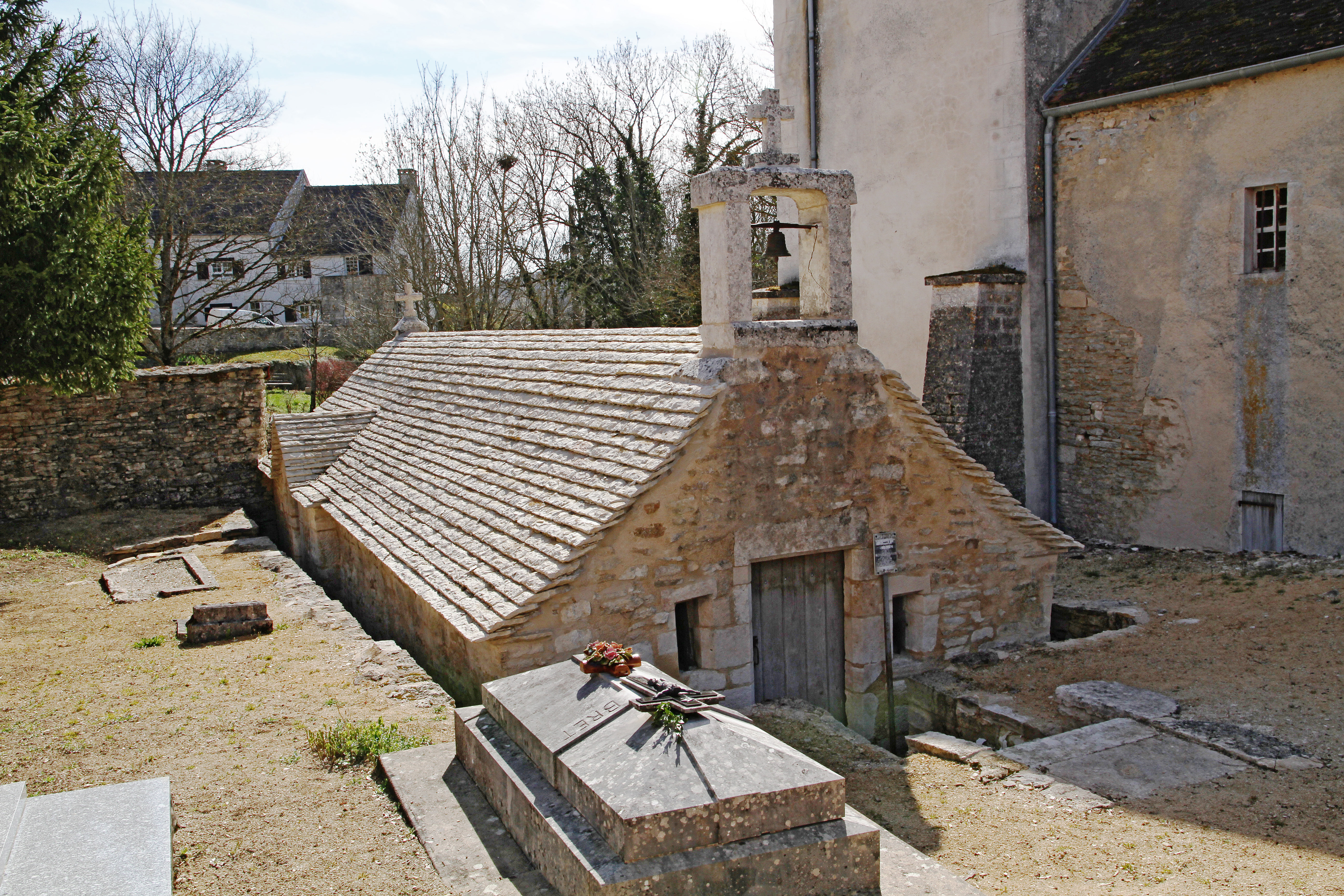 Chapelle Saint-Frodulphe dans le cimetière de Barjon